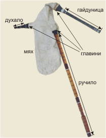 Вижте дискусията за лиценза на беседата.